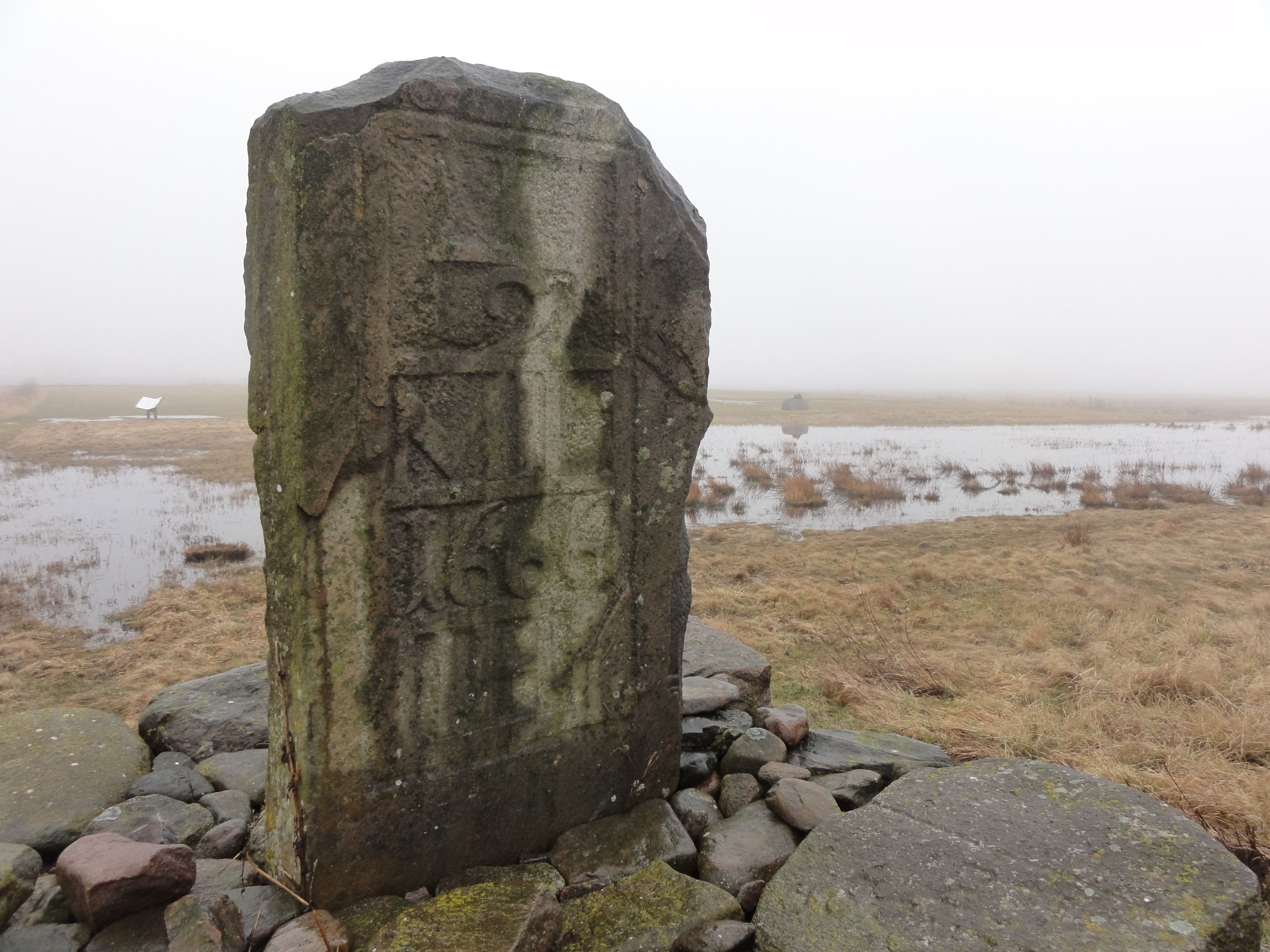 En milsten från 1666 framför platsen där klosterruinen finns.